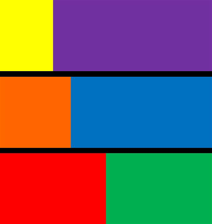 Nach Johann Wolfgang von Goethe bilden Komplementärfarbenpaare ein ausgewogenes Verhältnis in Bezug auf ihre Leuchtstärke: Gelb:Violett = 1:3, Orange:Blau = 1:2, Rot:Grün = 1:1.